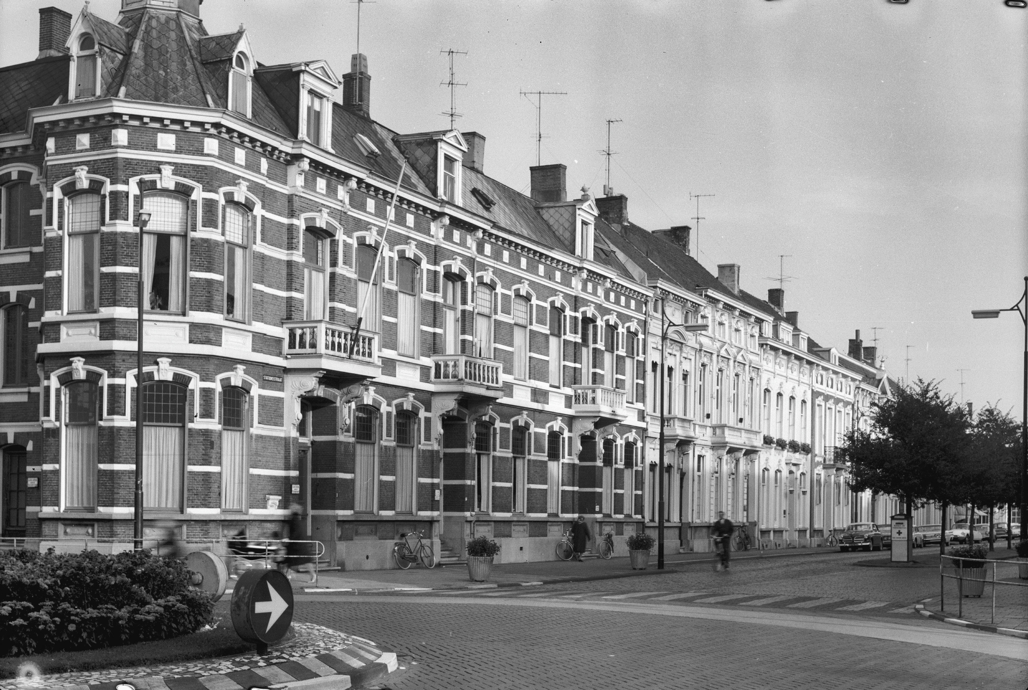 zijde oneven nrs.